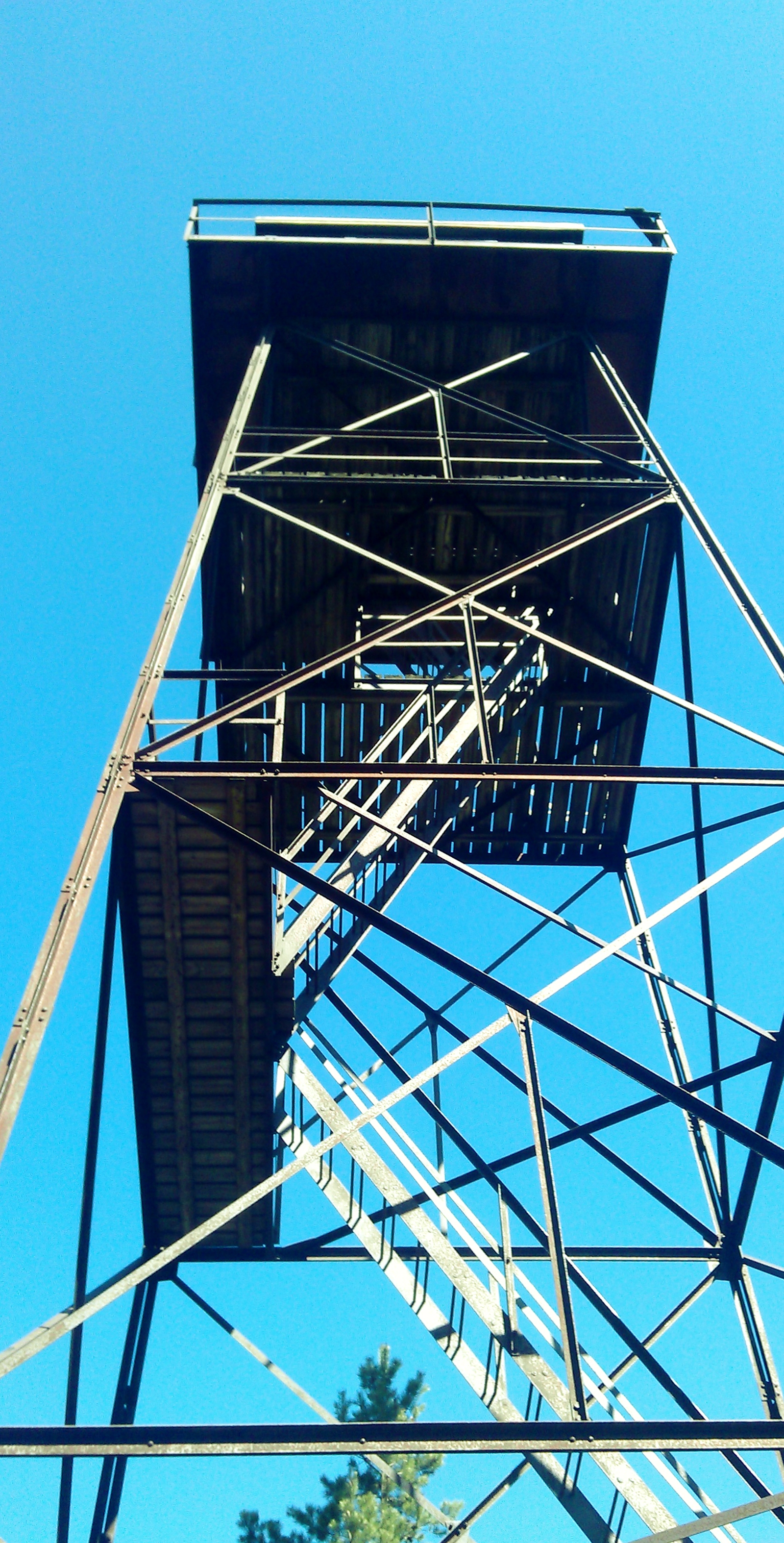 Elgheiatårnet i Aurskog-Høland kommune.